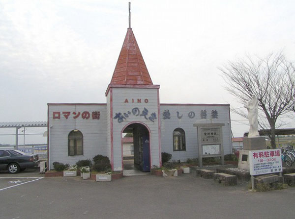 愛野駅 右手前が「ほほえみの像」、右奥がに示した温泉軽便鉄道の記念碑である。 2007年3月23日、投稿者が撮影。